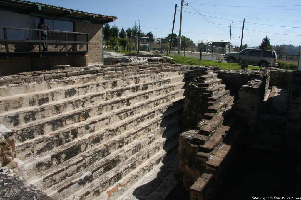 Totolac, Tlaxcala Foto: J. Guadalupe Pérez /2014